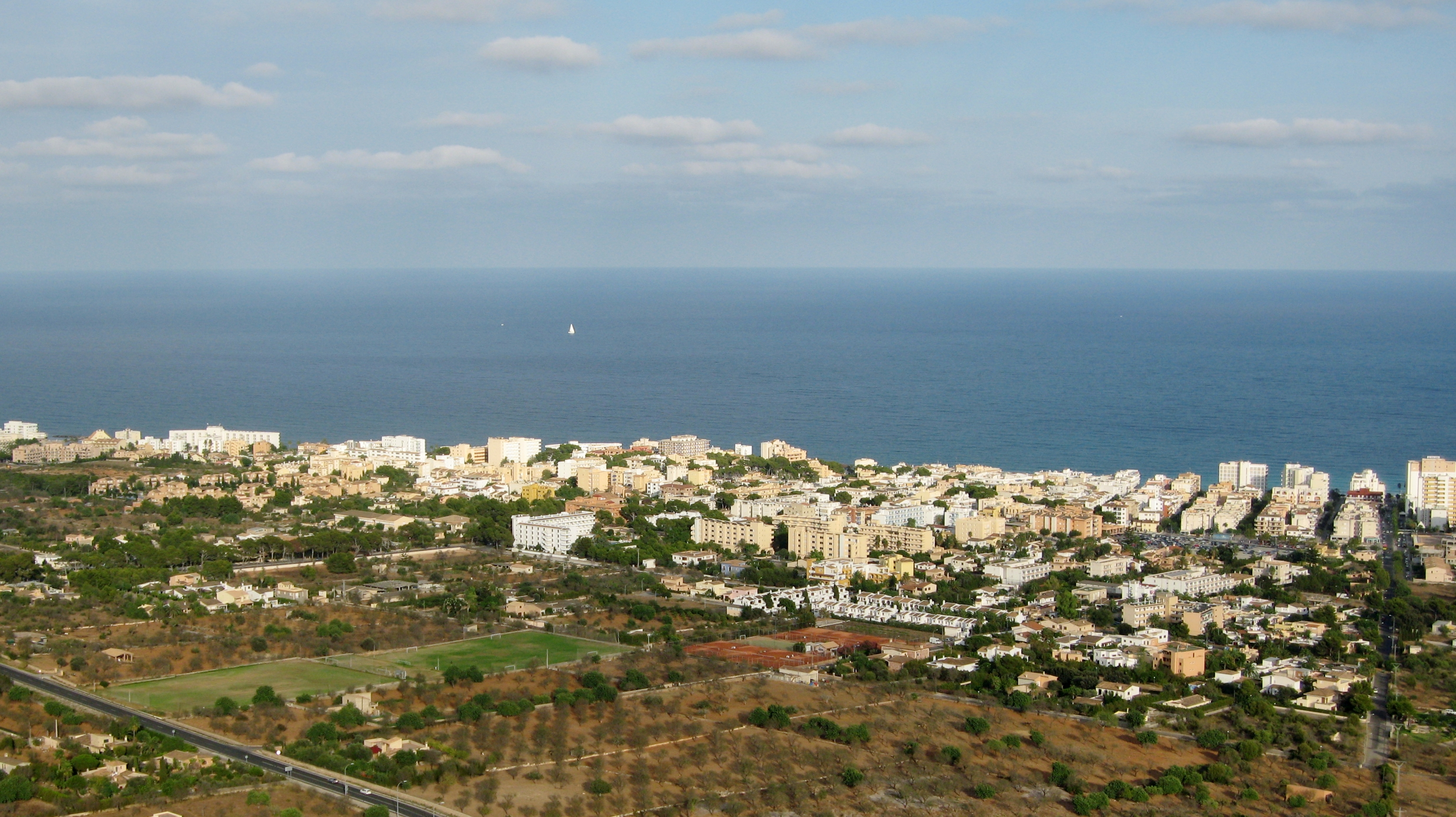 Blick auf Cala Millor, Gemeinde Son Servera, vom Berg Na Penyal, Mallorca, Spanien